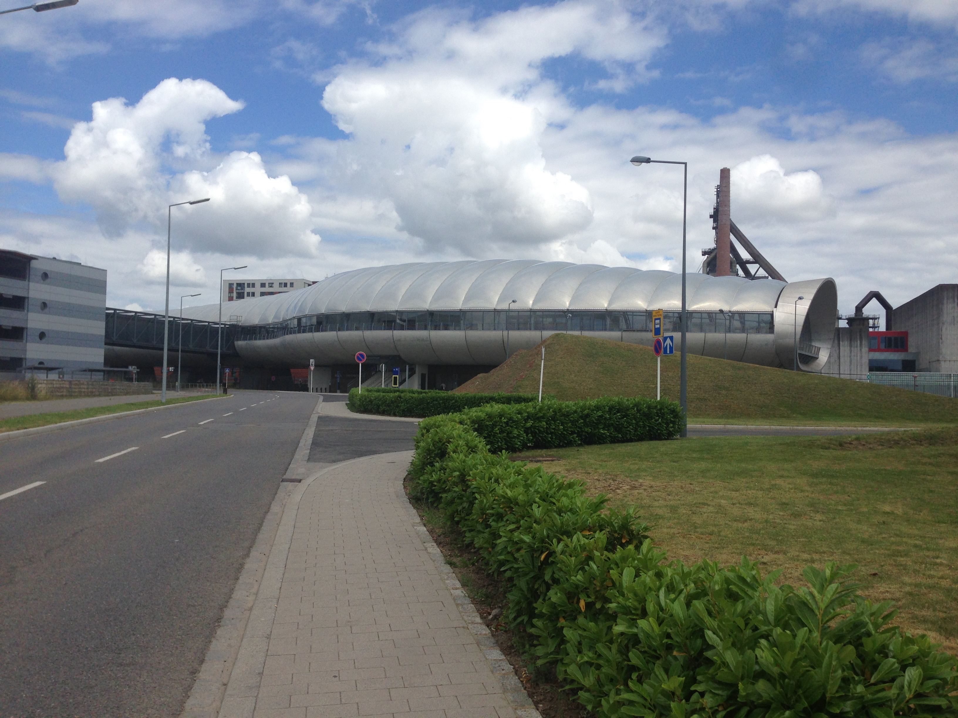 Bahnhof "Universität Belval" in Esch an der Alzette in Luxemburg